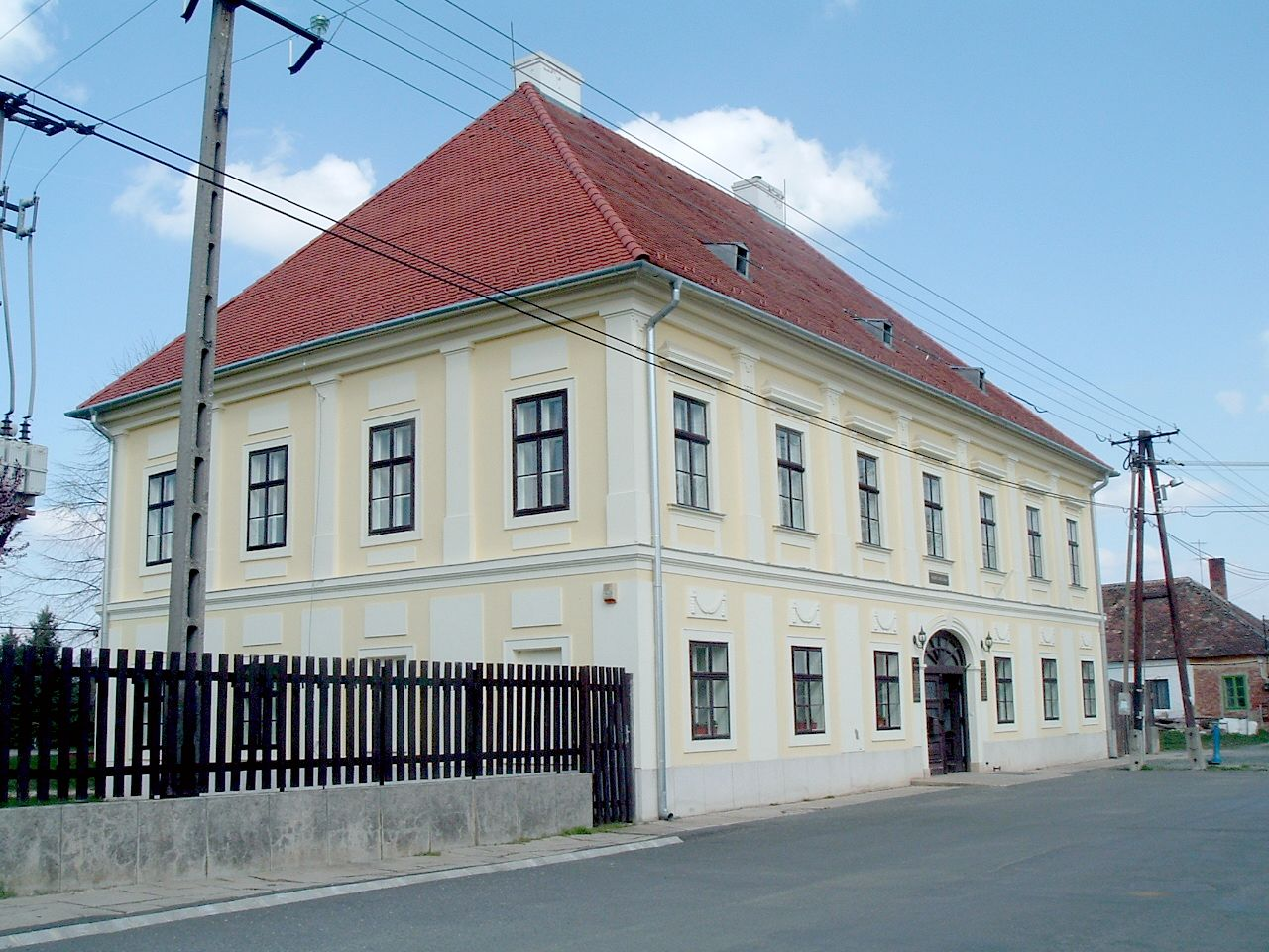 Zarkaháza, Szily manor-house